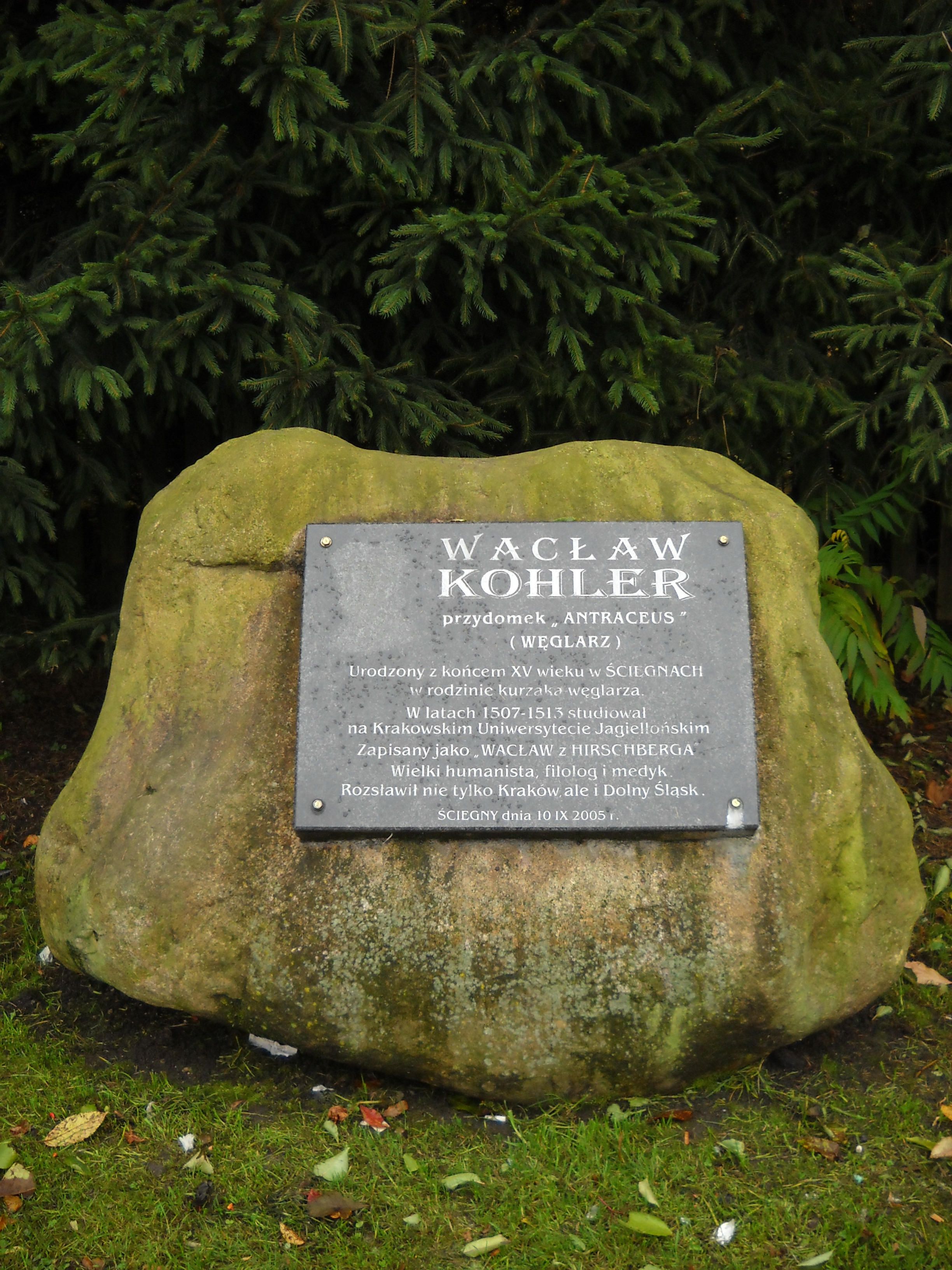 Tablica pamięci Wacława Kohlera